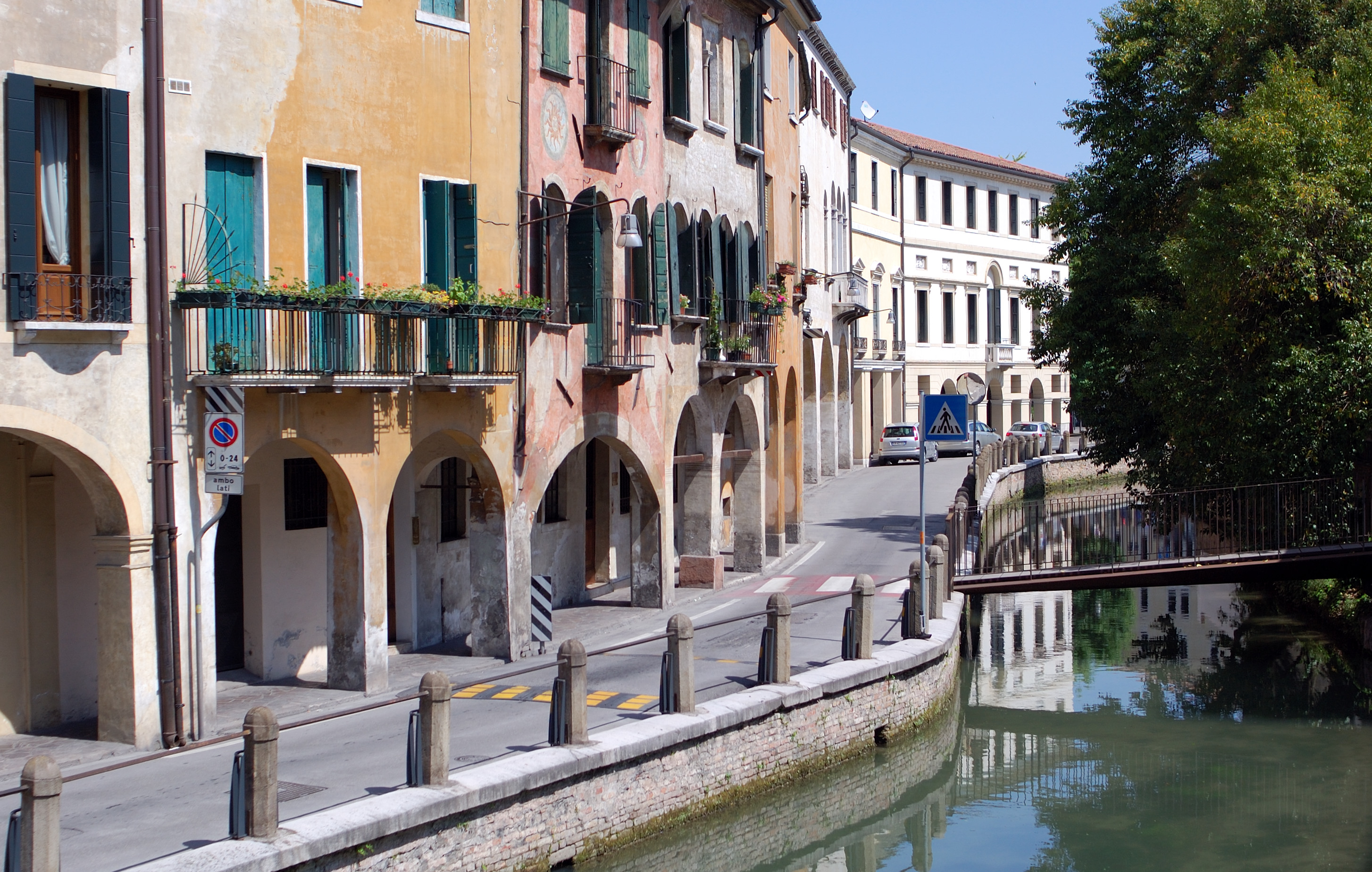 Canale di Treviso